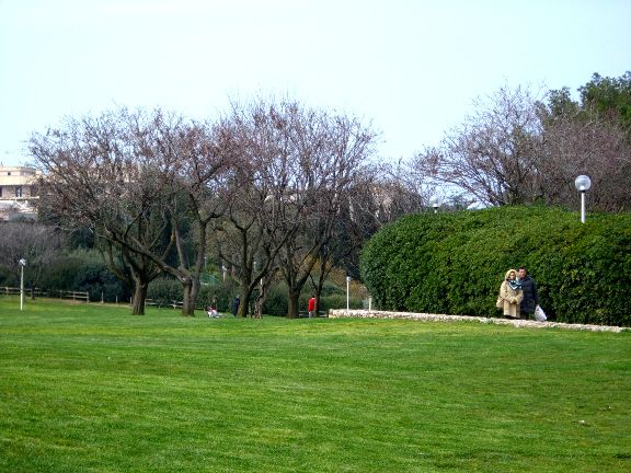 Bari, Italy, 2 Giugno park